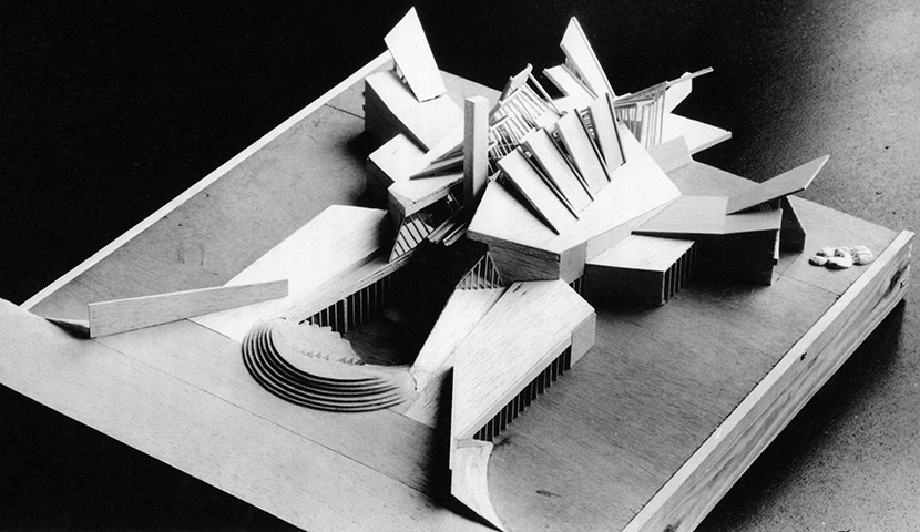 Modell für ein Freizeitzentrum in Vaduz von Ricardo Porro.